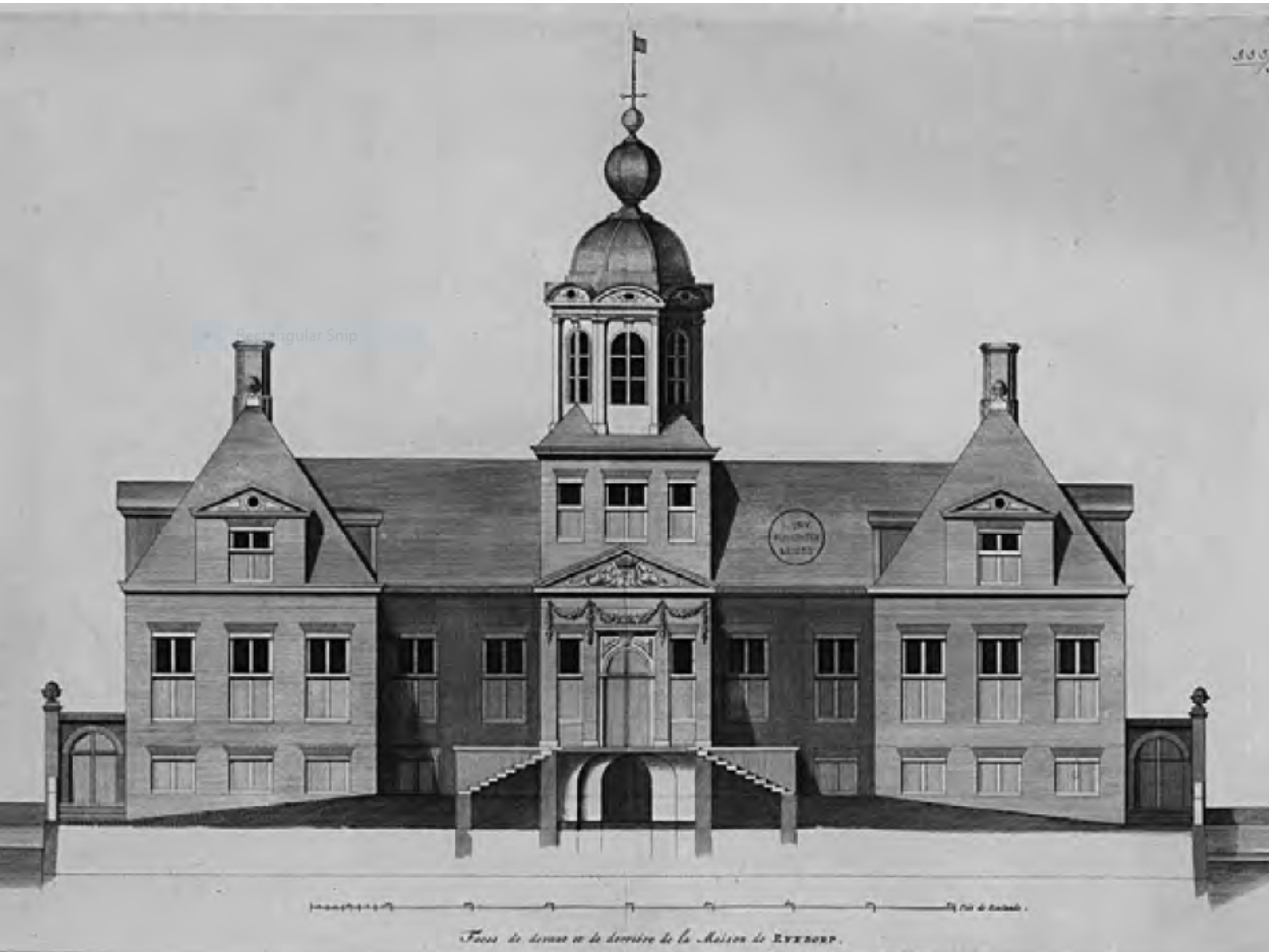 Pieter Post